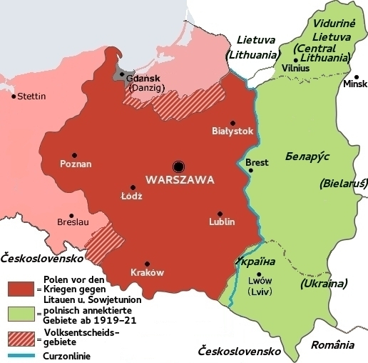 Curzonlinie 1920-22